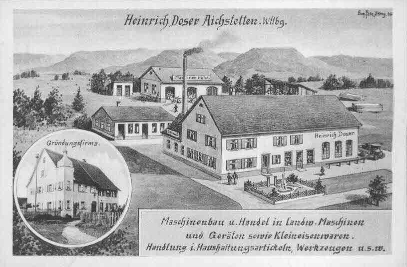 Ansichtskarte von Eugen Felle; Technoseum (Landesmuseum für Technik und Arbeit Mannheim)Motiv: Aichstetten, Maschinenbau und Handel Heinrich Doser